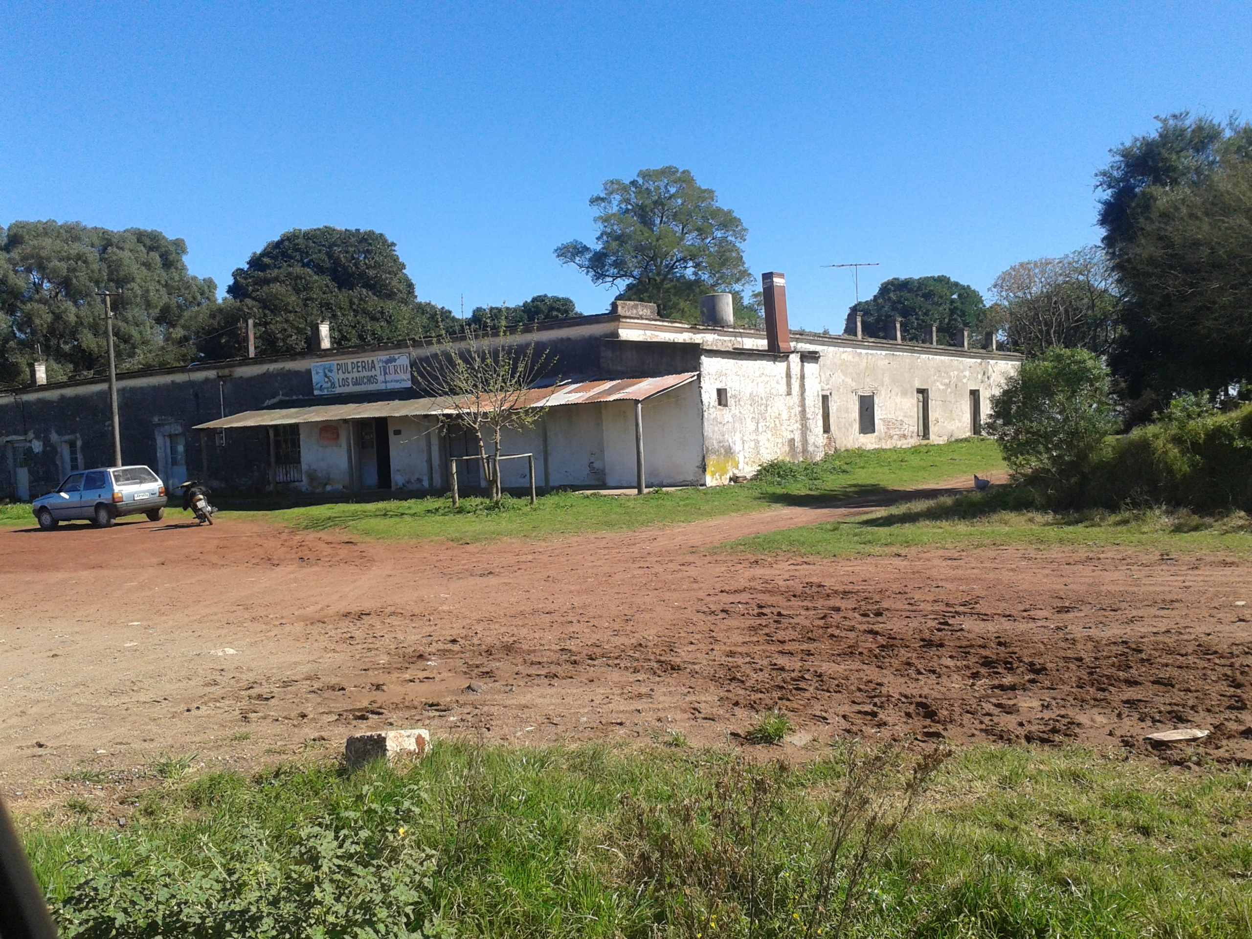 Pulperia del pueblo